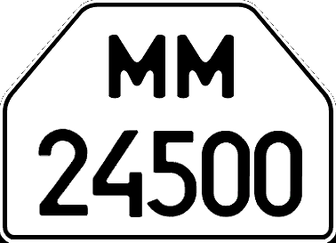 Номер тракторных прицепов Украины, 1995-2004 годы